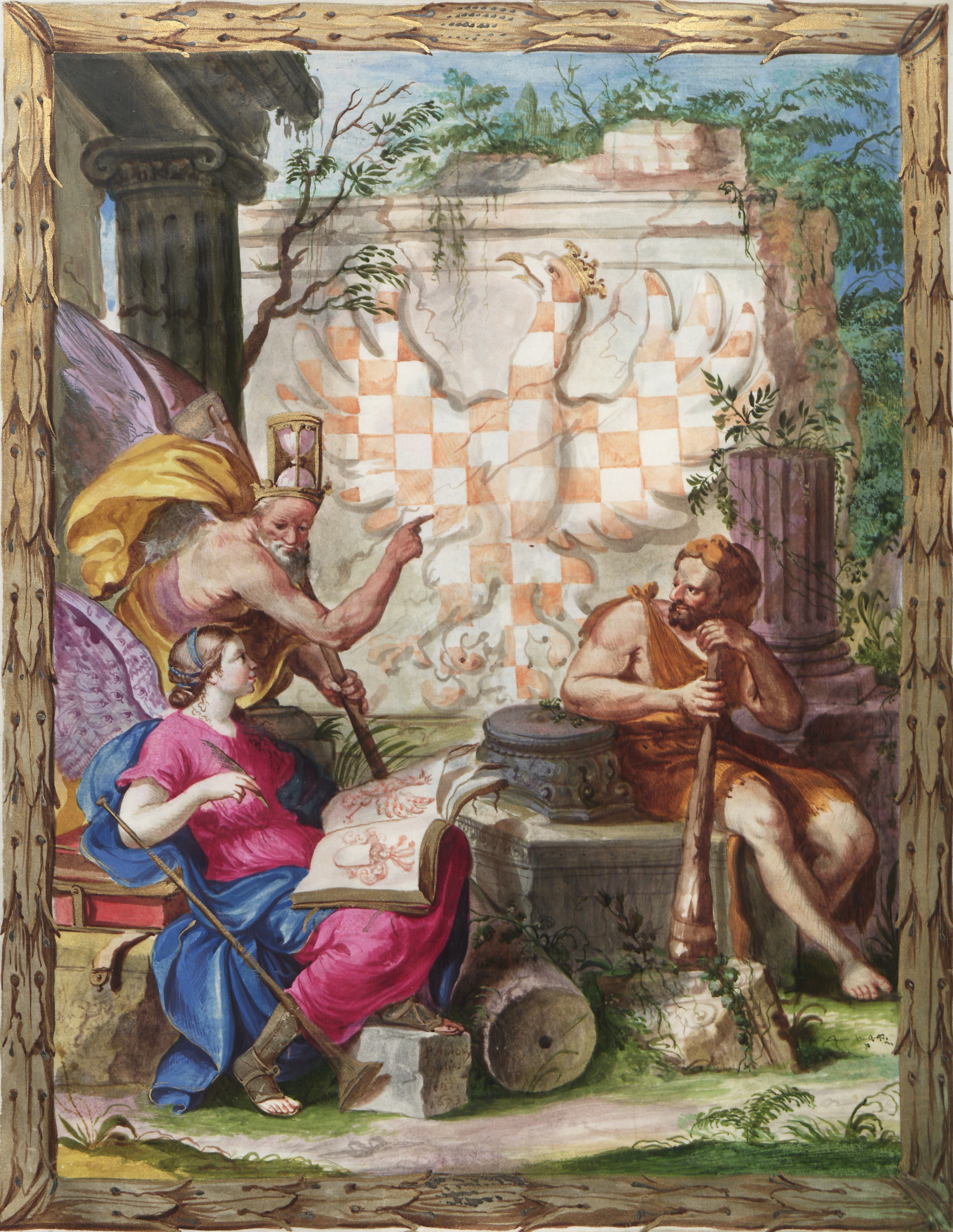 MZA v Brně, A 3 Stavovské rukopisy, inv. č. 46, Kniha stavu rytířského, rok 1671